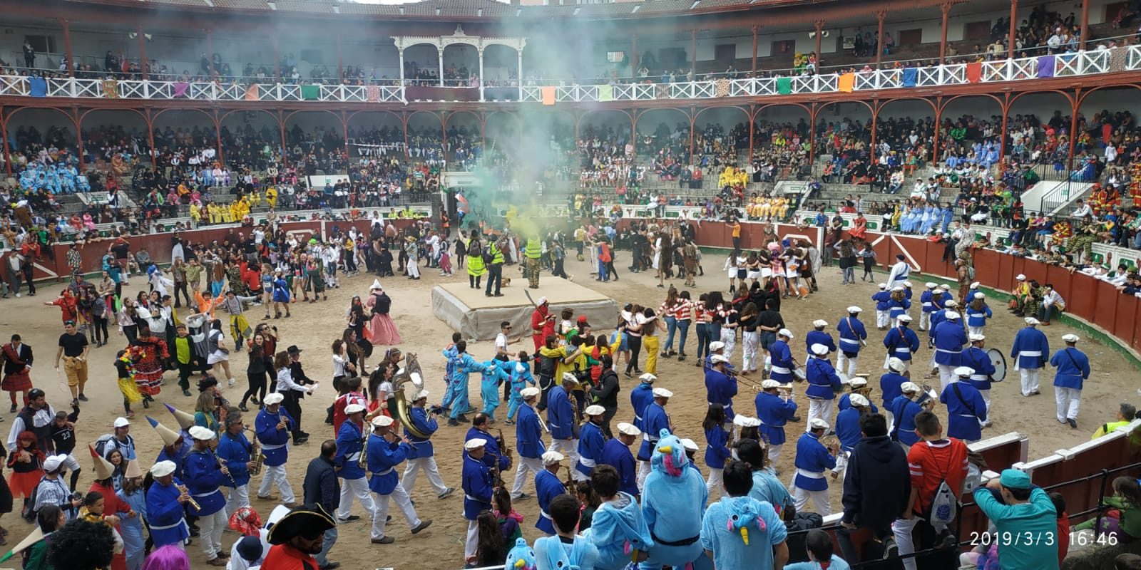 Tolosako inauteriak